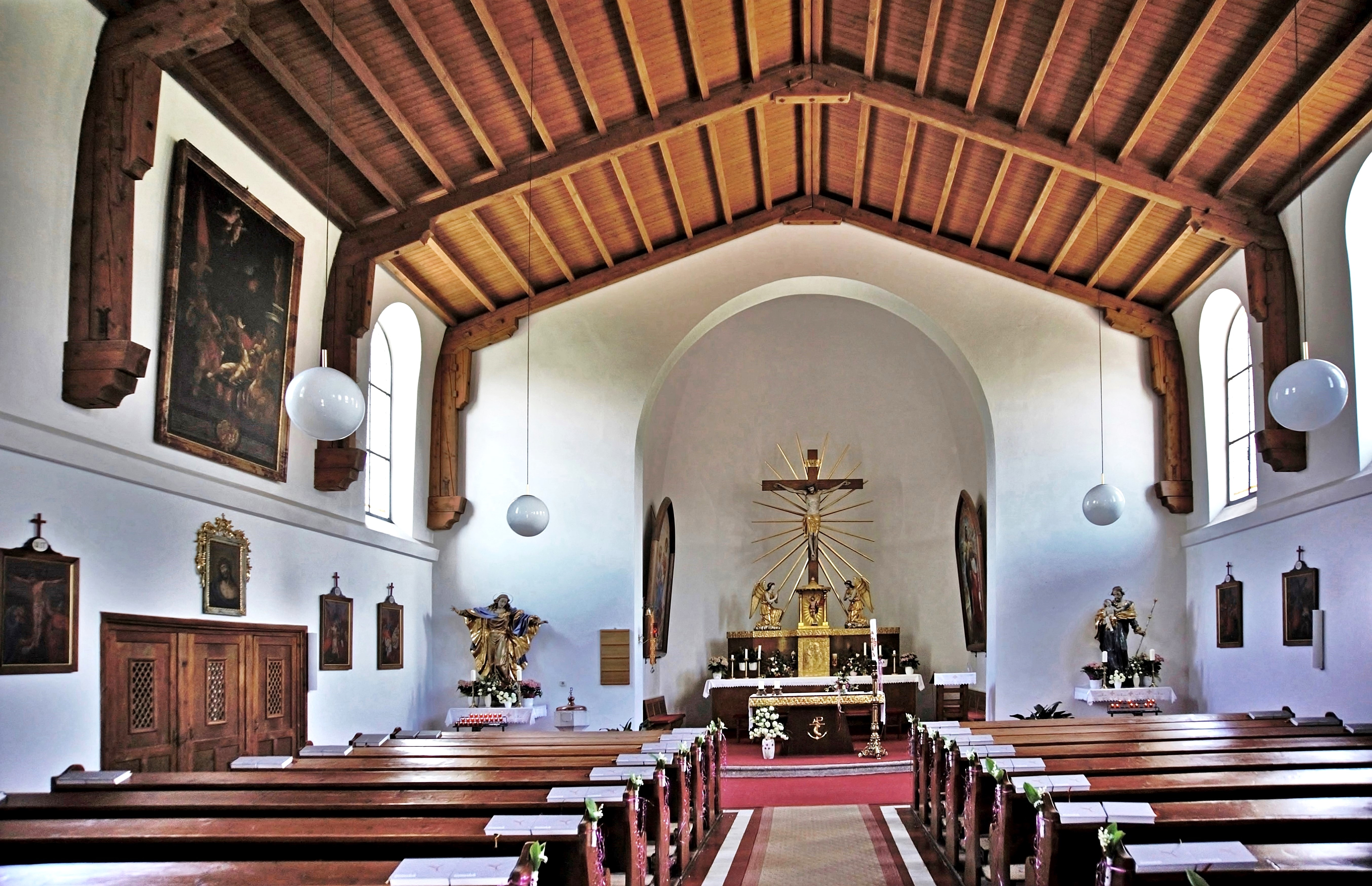 Kath. Pfarrkirche St. Josef in Bodensdorf, Innenansicht